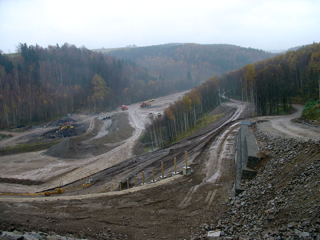 Bau des Rückhaltebeckens Lauenstein (during construction 2005-11-0)